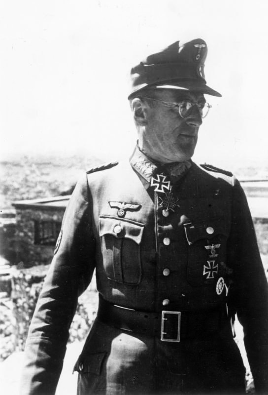 Ferdinand Schörner Südostfront: (Griechenland) Ein deutscher General besucht die Akropolis. PK-Aufnahme: Kriegsberichter: Scheerer (Sch.) 4619-41."Fr." "Fr.OKW" April 41 [Gen. Oberst Ferdinand Schörner (Porträt)] Abgebildete Personen: Schörner, Ferdinand: Generalfeldmarschall, Ritterkreuz (RK), Heer, Deutschland (GND 118610279)